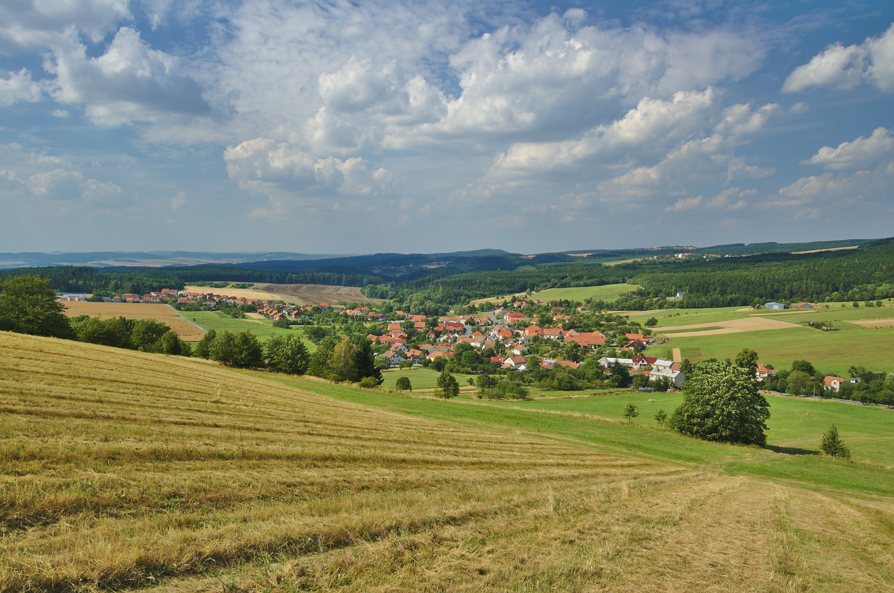 Pohled na Valchov od jihu, okres Blansko